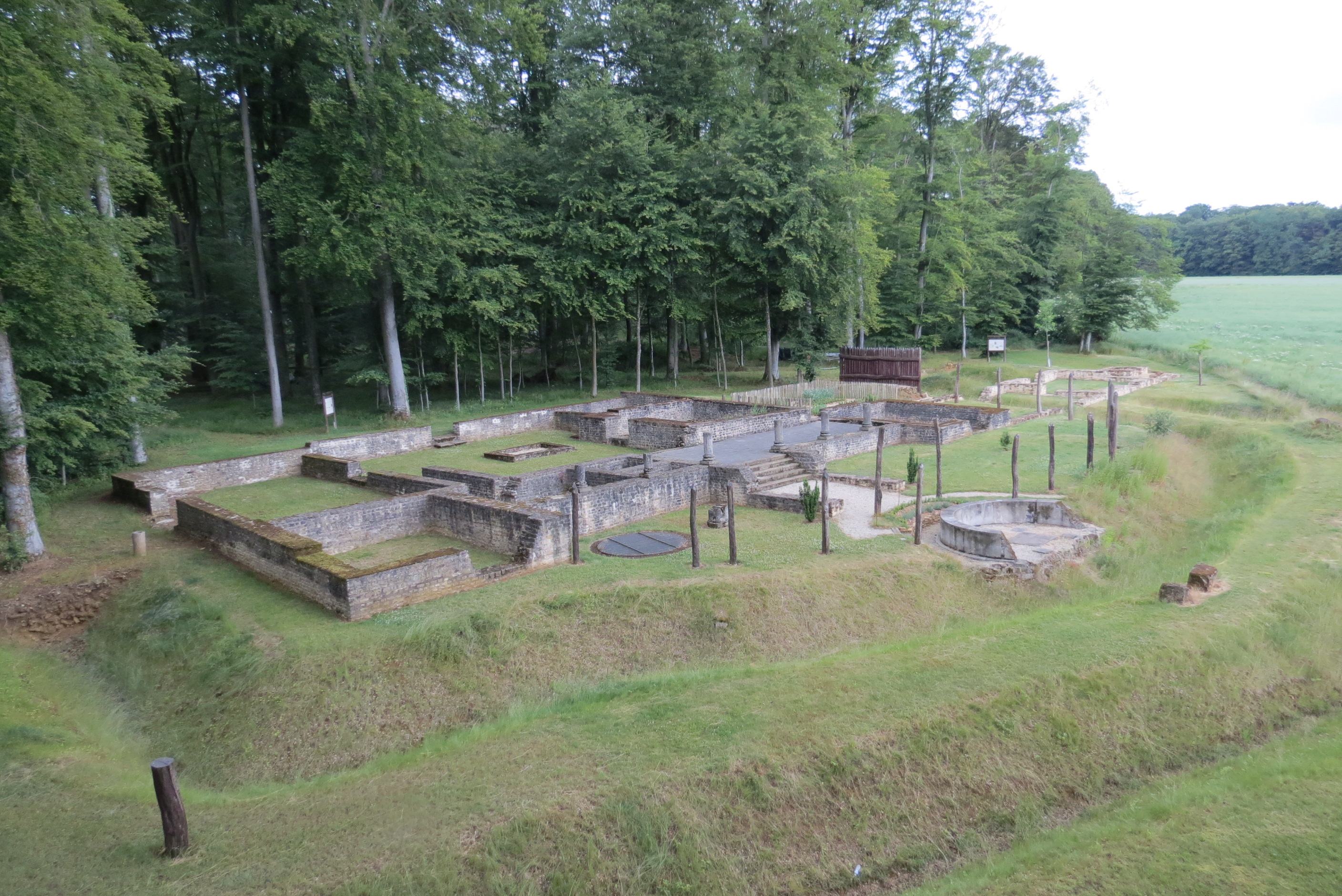 Bléck op d'Haaptwunngebai